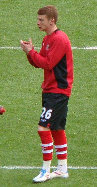 Jordan Cook